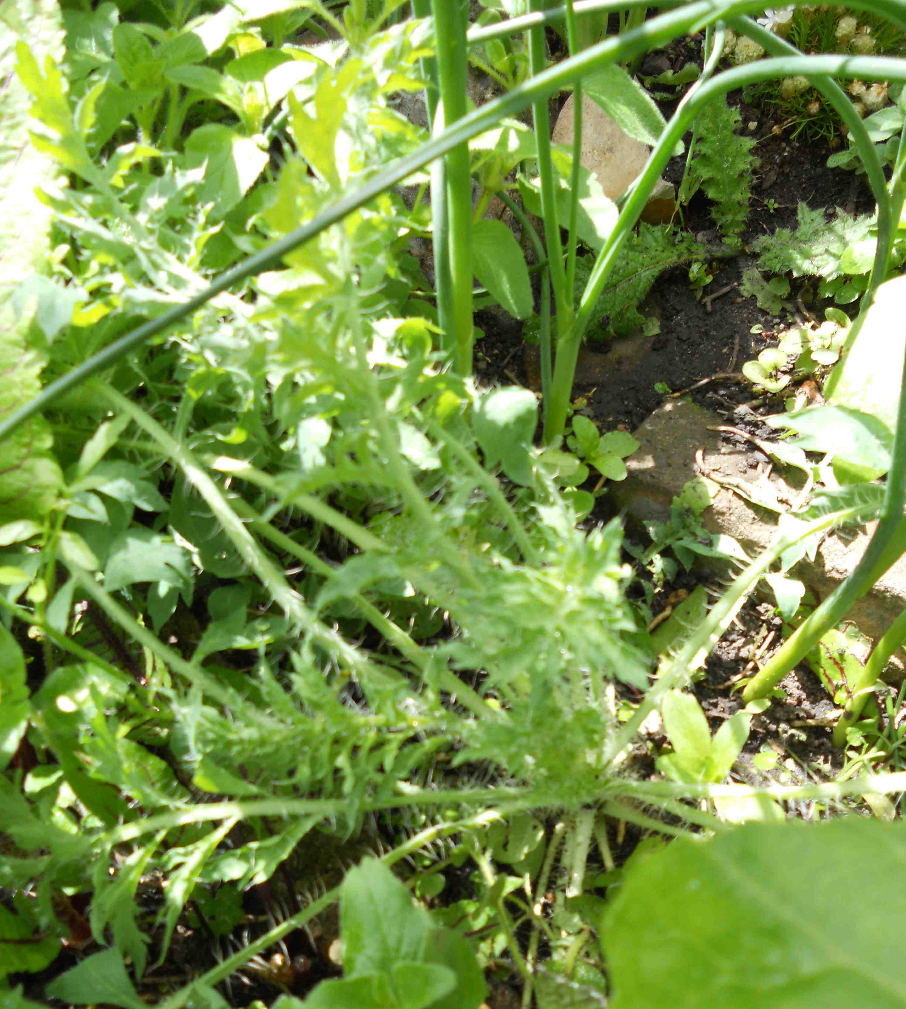 Rosette des armenischen Mohns im 2. Jahr vor der Blüte